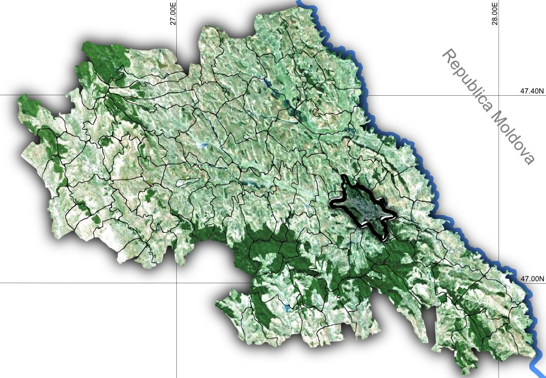 Iasi jud Iasi.